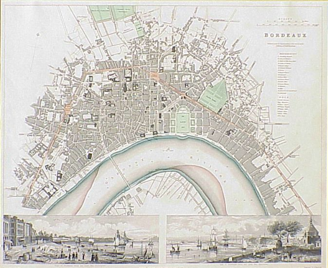 Stadtplan von Bordeaux aus dem Jahr 1840. Oben: Westen. Rote Linie: ehemalige Stadtmauer.